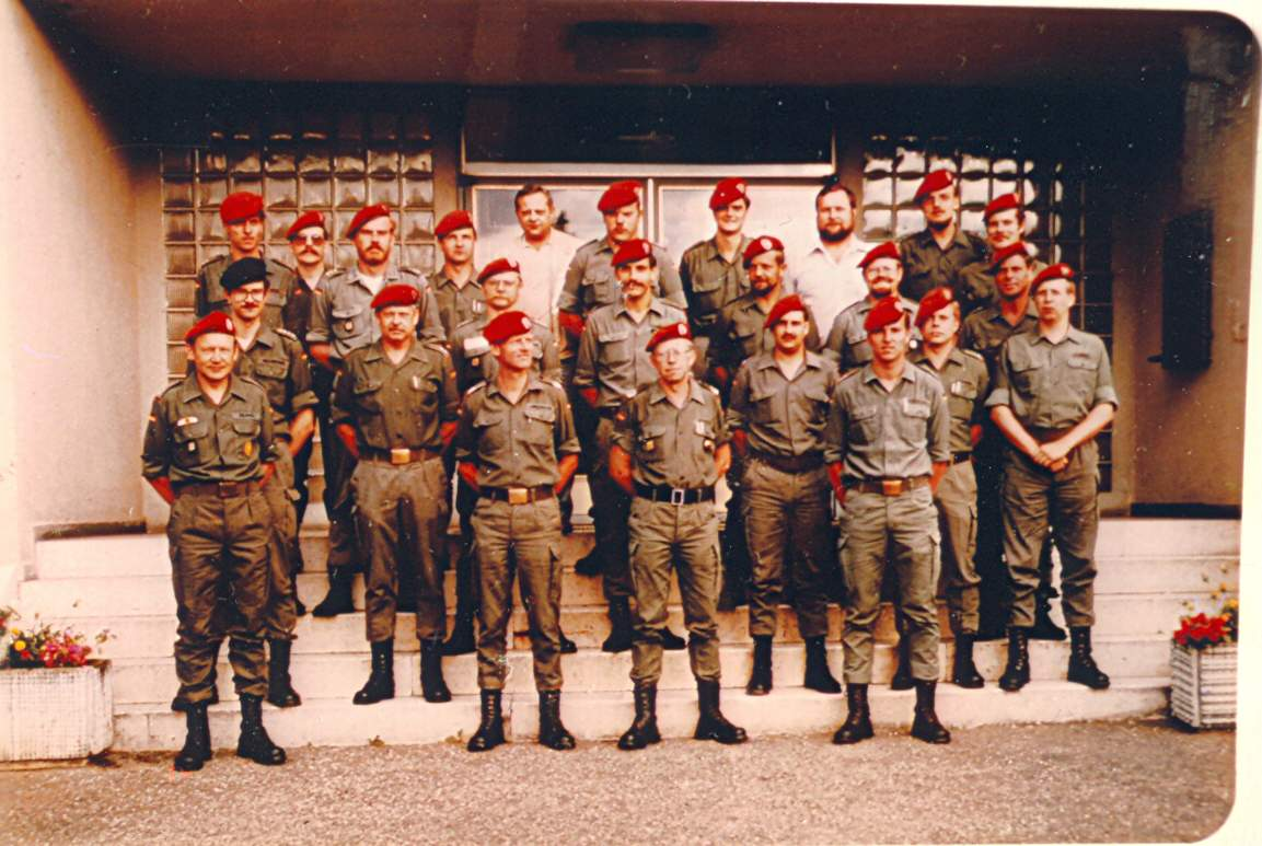 Bild des Offizierkorps vor dem Eingang des Stabsgebäudes in der Salm-Kaserne PhilippsburgIn der Mitte vorne (mit schwarzem Koppel) der damalige Kommandeur Oberstleutnant Dr. Waldis Greiselis (*1939)